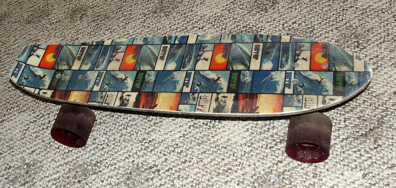 1970s Surfer print fiberglass skateboard